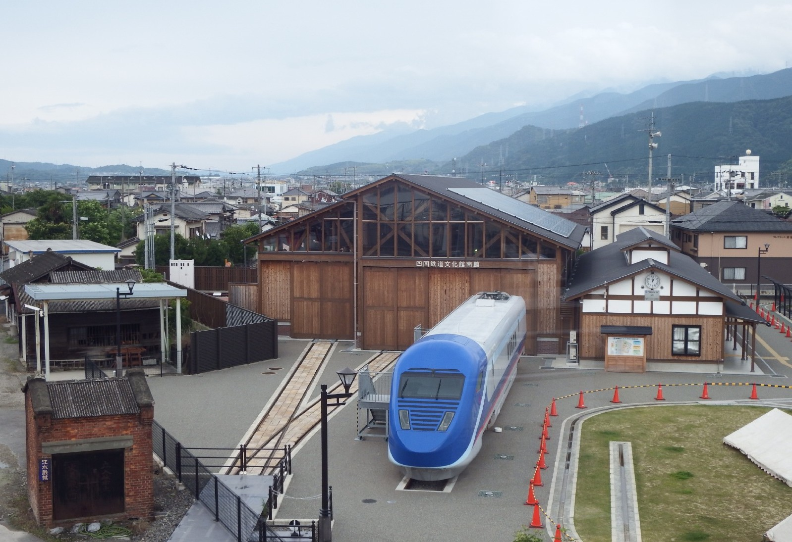 四国鉄道文化館南館とフリーゲージトレイン